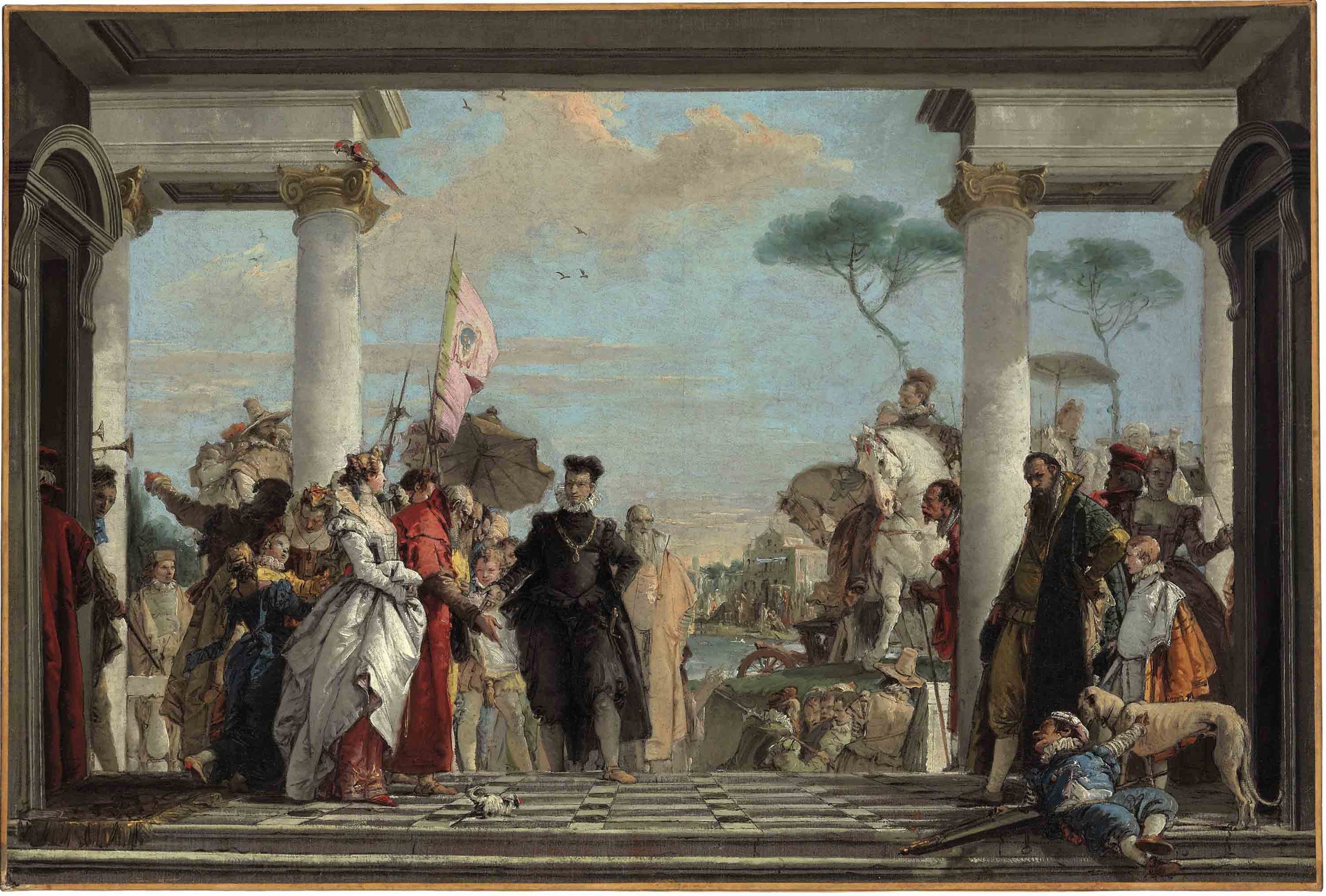 sketch